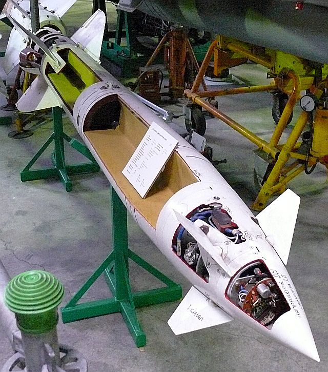 AS-7, eigenes Bild